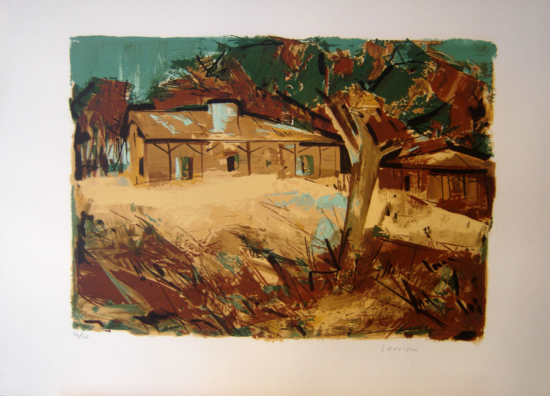 L'Amour des Landes, lithographie n°3 reproduite avec l'aimable autorisation de Michèle Larrieu